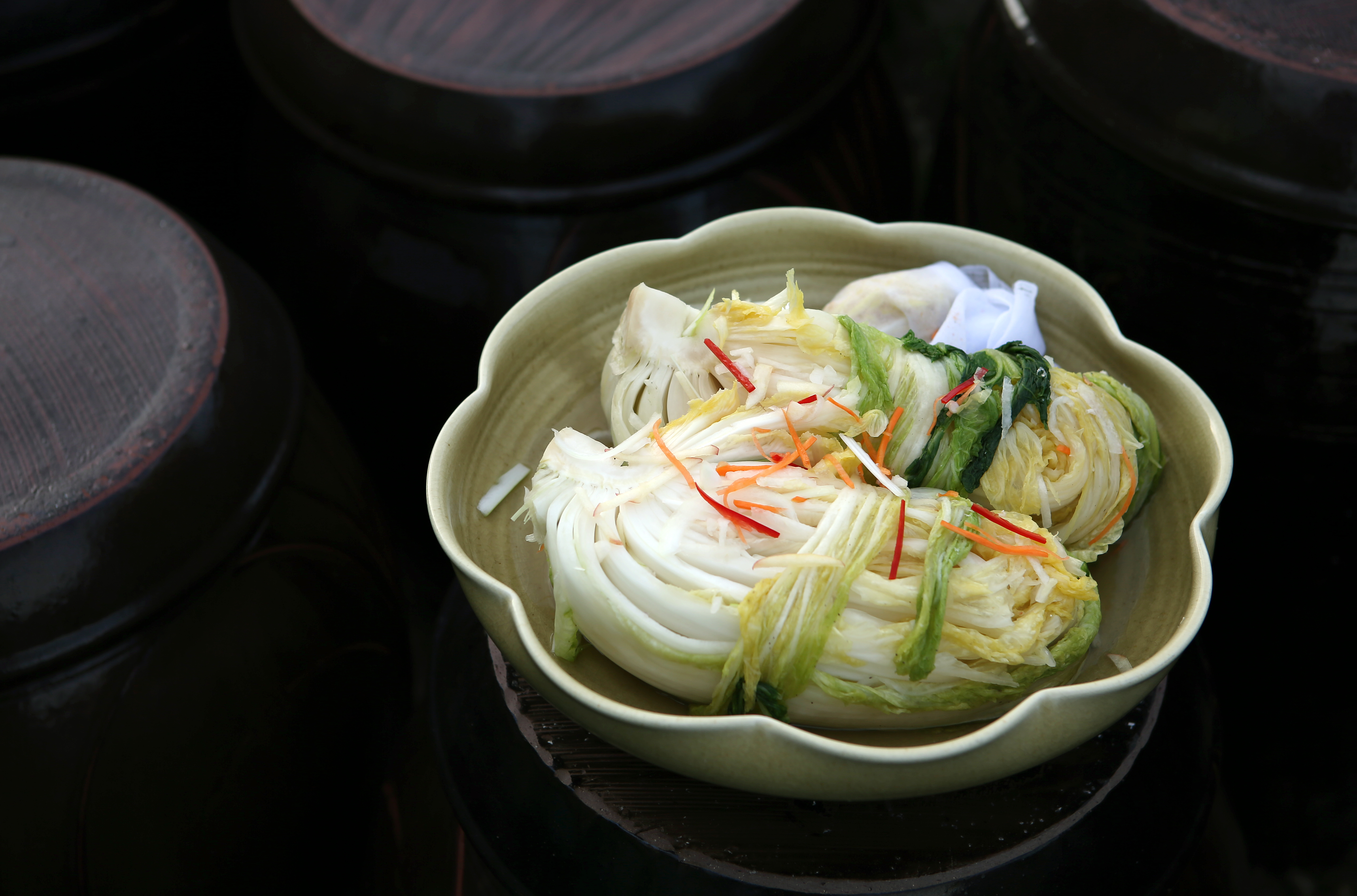 10 Korean Cuisines for 2018 PyeongChang Winter Olympic Games Cooking for Triple White Kimchi September 15, 2017 Institute of Traditional Korean Food, Jongno-gu, Seoul Ministry of Culture, Sports and Tourism Korean Culture and Information Service ( Official Photographer : Jeon Han This official Republic of Korea photograph is being made available only for publication by news organizations and/or for personal printing by the subject(s) of the photograph. The photograph may not be manipulated in any way. Also, it may not be used in any type of commercial, advertisement, product or promotion that in any way suggests approval or endorsement from the government of the Republic of Korea. 2018 평창 동계올림픽대회를 위한 세계인이 좋아하는 한식 10선 트리플 김치 만들기 2017-09-15 한국전통음식연구소 문화체육관광부 해외문화홍보원 코리아넷 전한